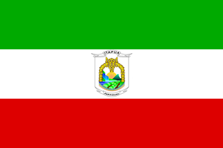 bandera del departamento de Itapúa